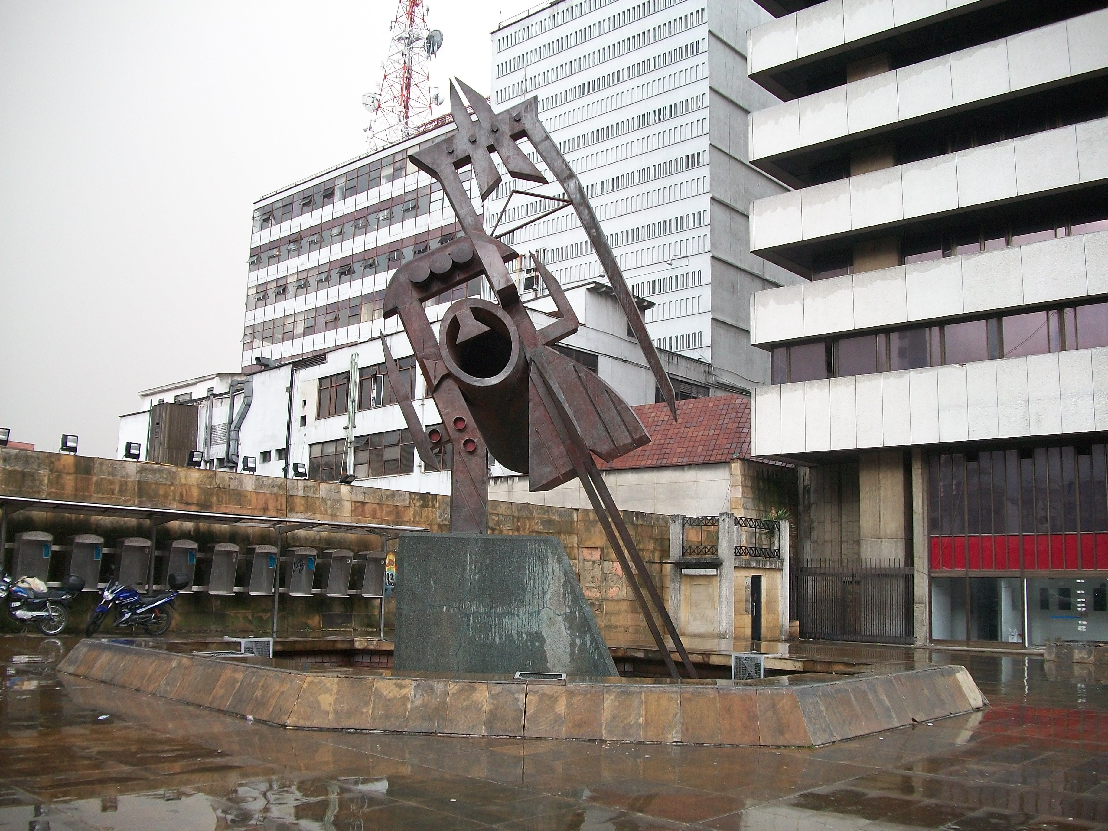 "Soltando la Onda", Bogotá, carrera 13 con 23. Edificio de Telecom. Obra de Alejandro Obregón. Pasada a bronce por el escultor Gerardo Benítez Bolaños.